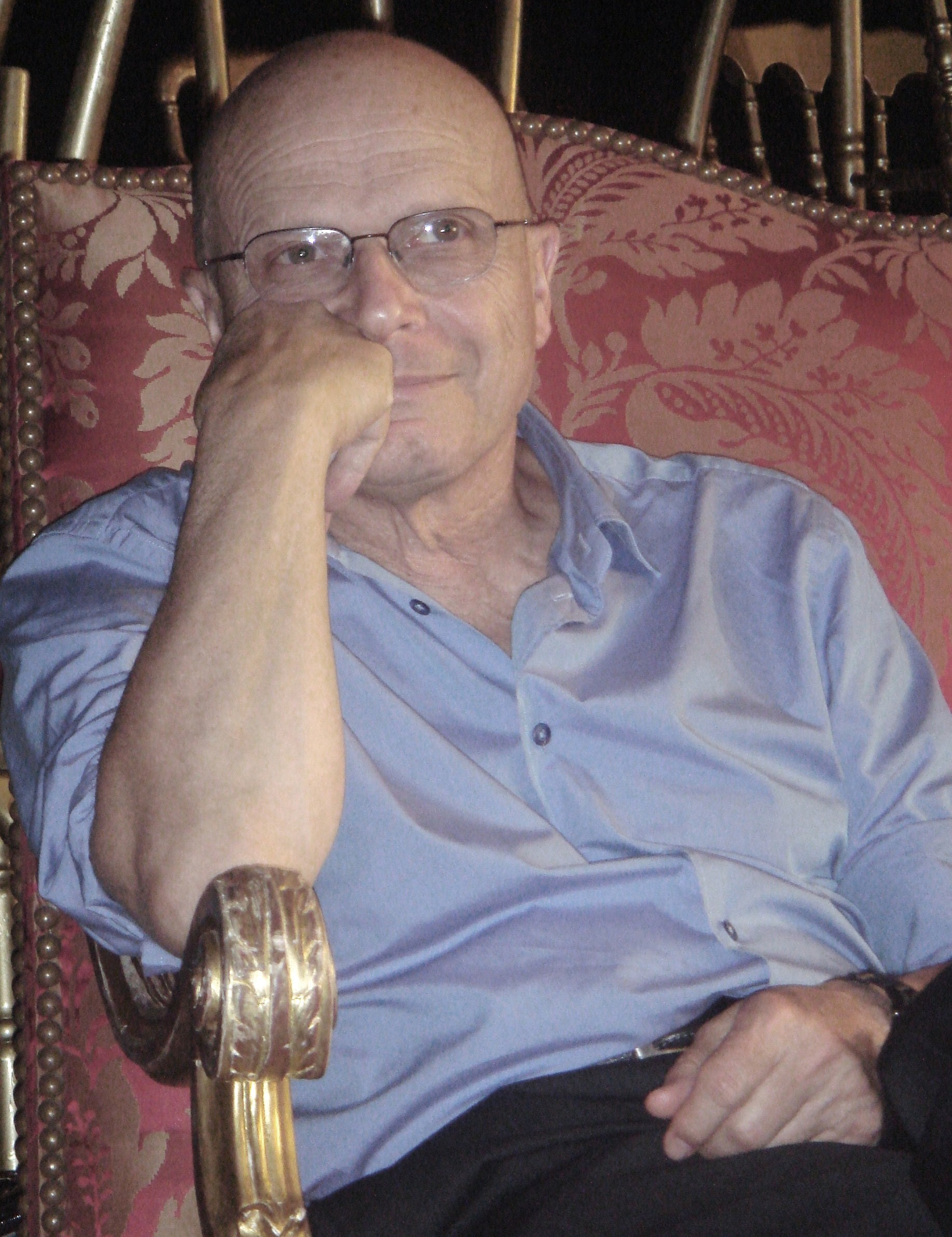 Photo de Bernard Stora - Juillet 07